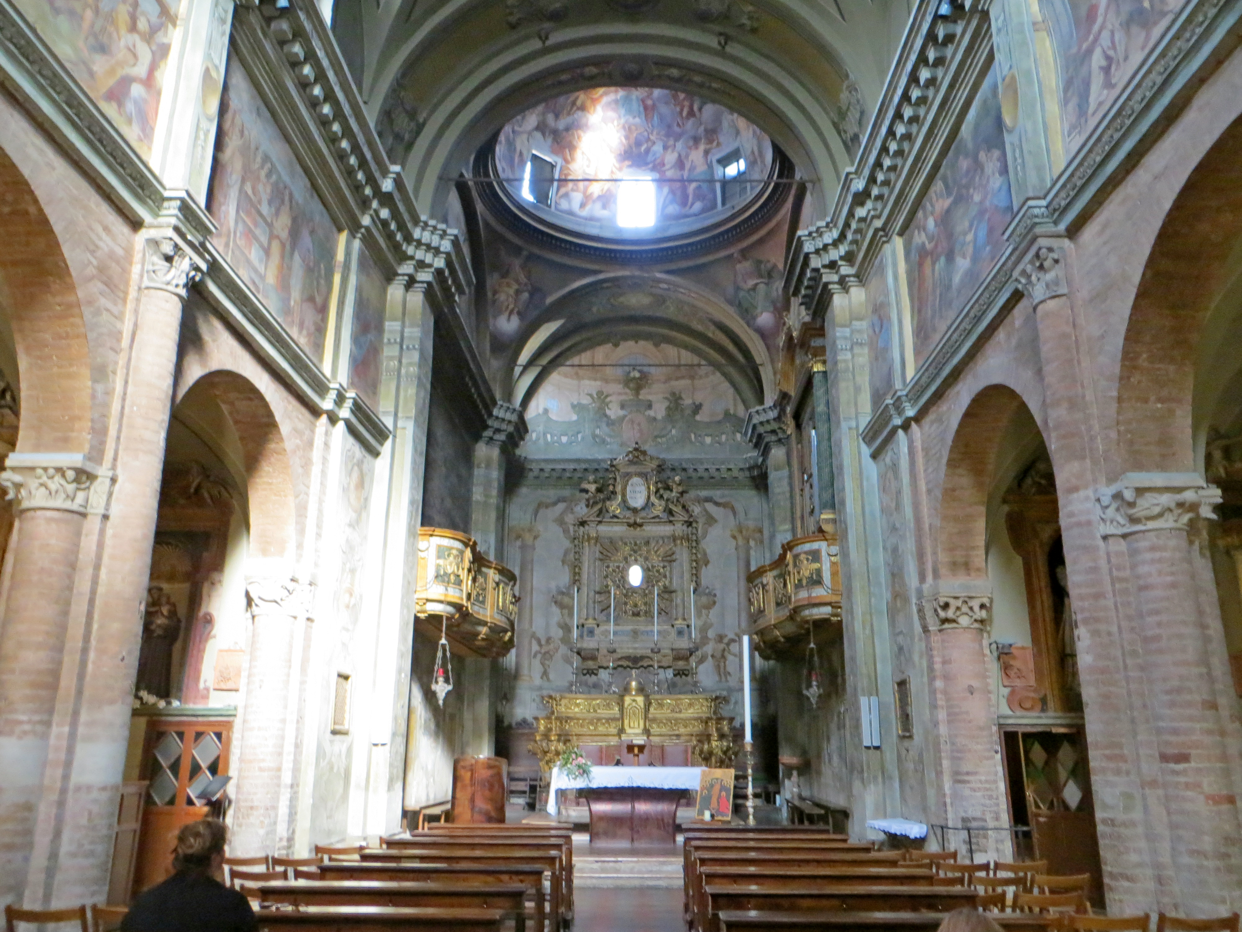 Chiesa di Santa Croce (Parma) - navate